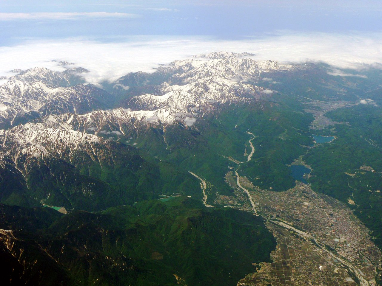 稿者撮影、北アルプスとja:仁科三湖、2007年5月28日撮影 Category:日本の湖沼画像 Category:日本の山の画像 Category:長野県の画像 Category:航空機からの画像 ---- 大町市郊外を流れる高瀬川と仁科三湖、残雪の後立山連峰。奥は白馬盆地